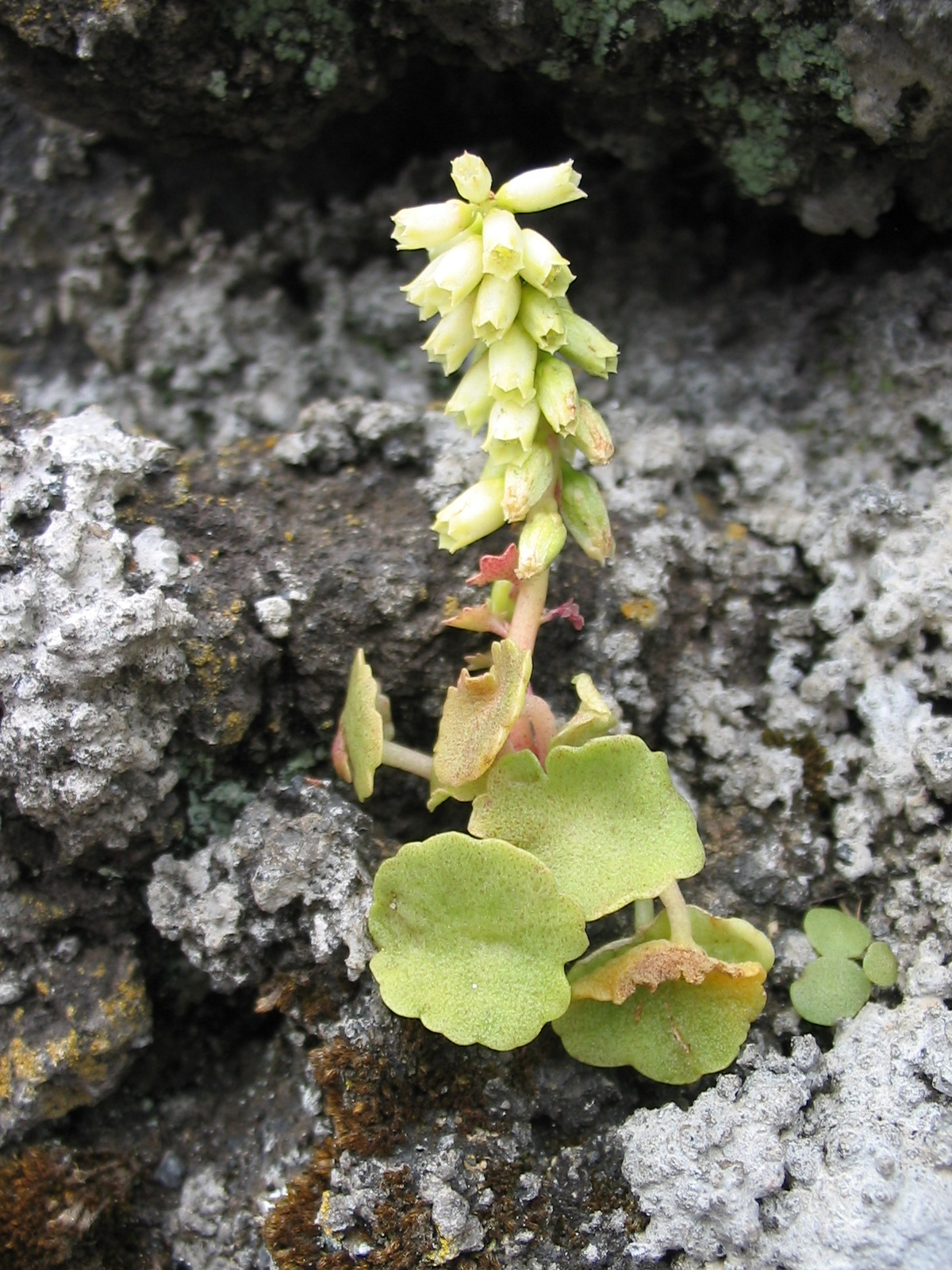 Felsen-Nabelkraut (Umbilicus rupestris) - Habitus